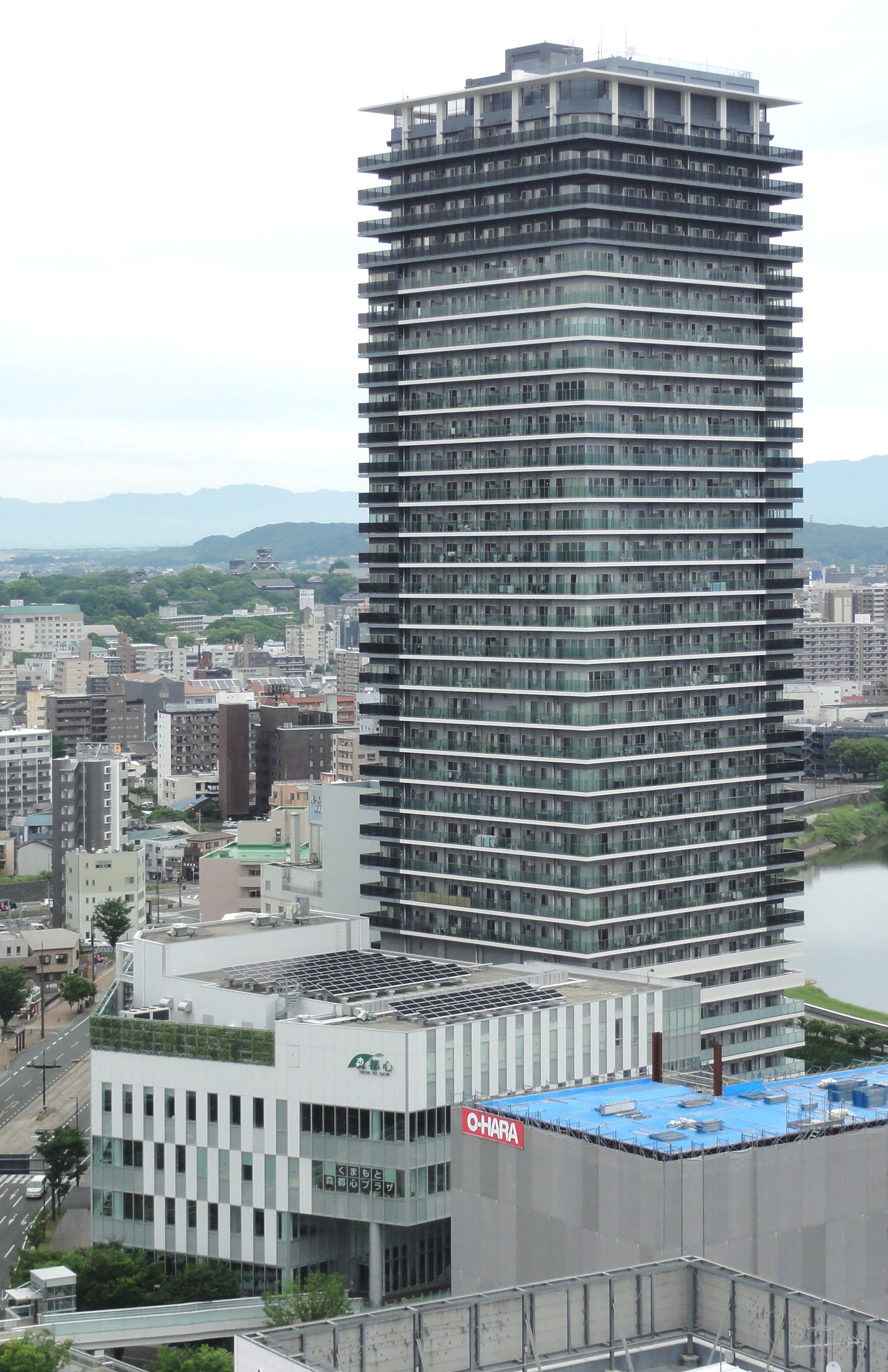 ザ・熊本タワー（熊本駅前）